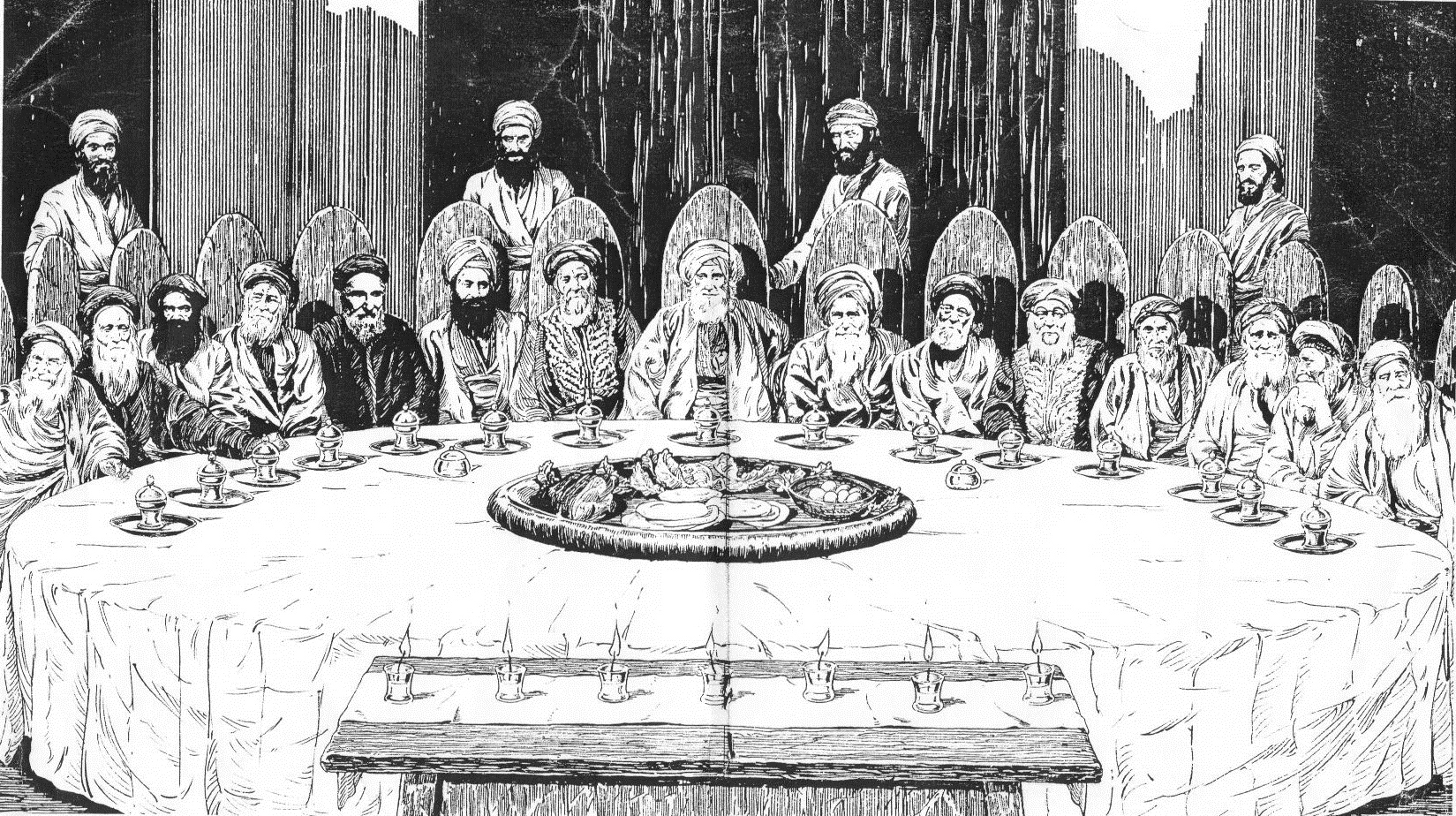 גדולי רבני בבל